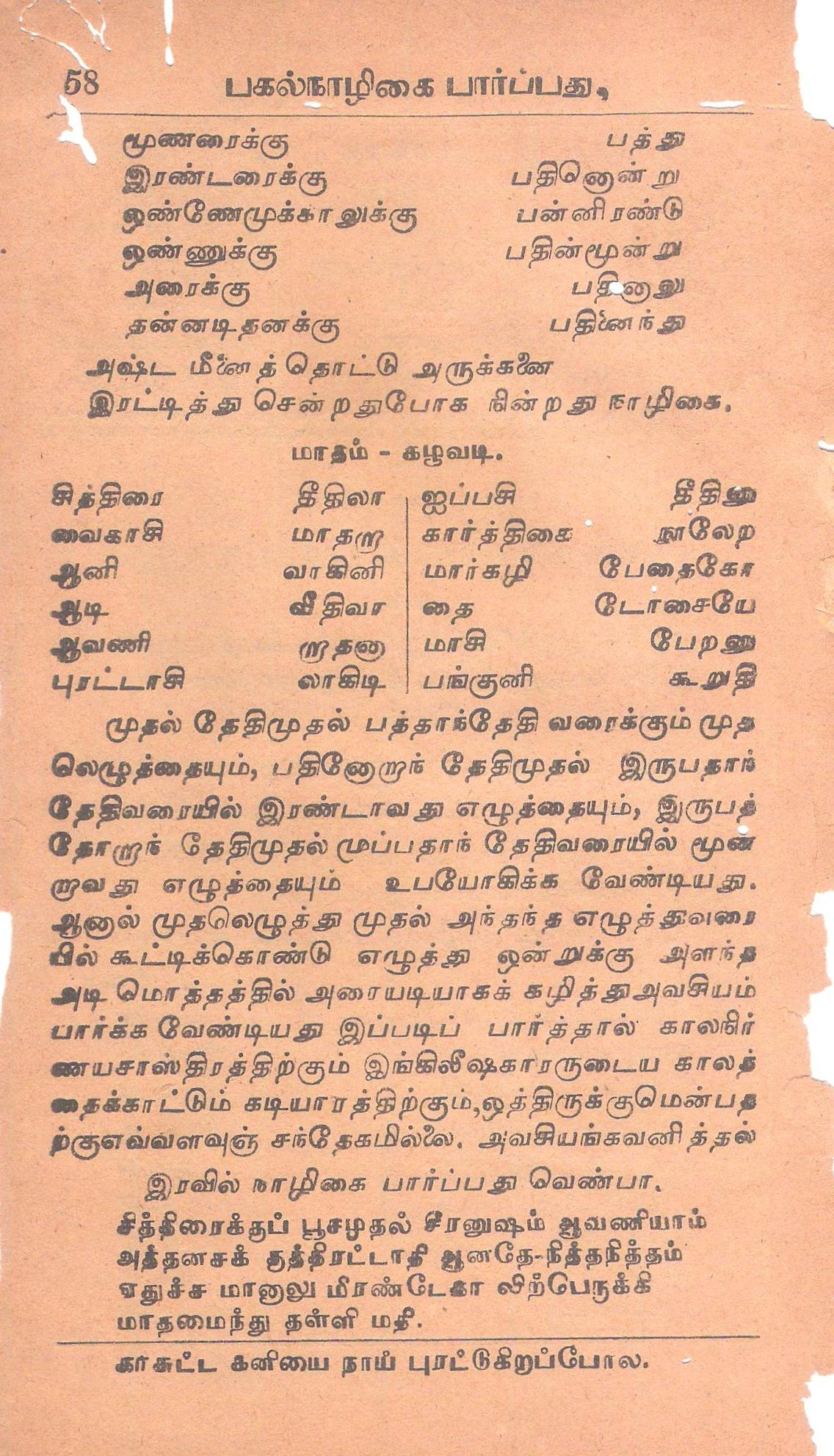 Tamils used to measure the division of a day by using any grass stem available at that place at times. They fold the stem into 16. They erect it folding in ‘L’ shape so as the shadow of the top of the ‘x’ stem to fall on the end of ‘y’ stem and calculate based on a calculation table already formed. Calculation table is given in a form Tamil song-poem in the document. Which star will be used in different months, is also added at the end of the document. இது தமிழர் பகலில் நாழிகை கண்டறிந்த முறைமையை விளக்கும் பாடலைக் கொண்டுள்ள ஆவணத்தின் தொடர் ஆவணம். இதன் இறுதியில் இரவில் காலம் கணிக்க எந்தெந்த மாதங்களில் எந்தெந்த விண்மீன் கூட்டத்தைப் பார்க்கவேண்டும் என்னும் கூறப்பட்டுள்ளது.